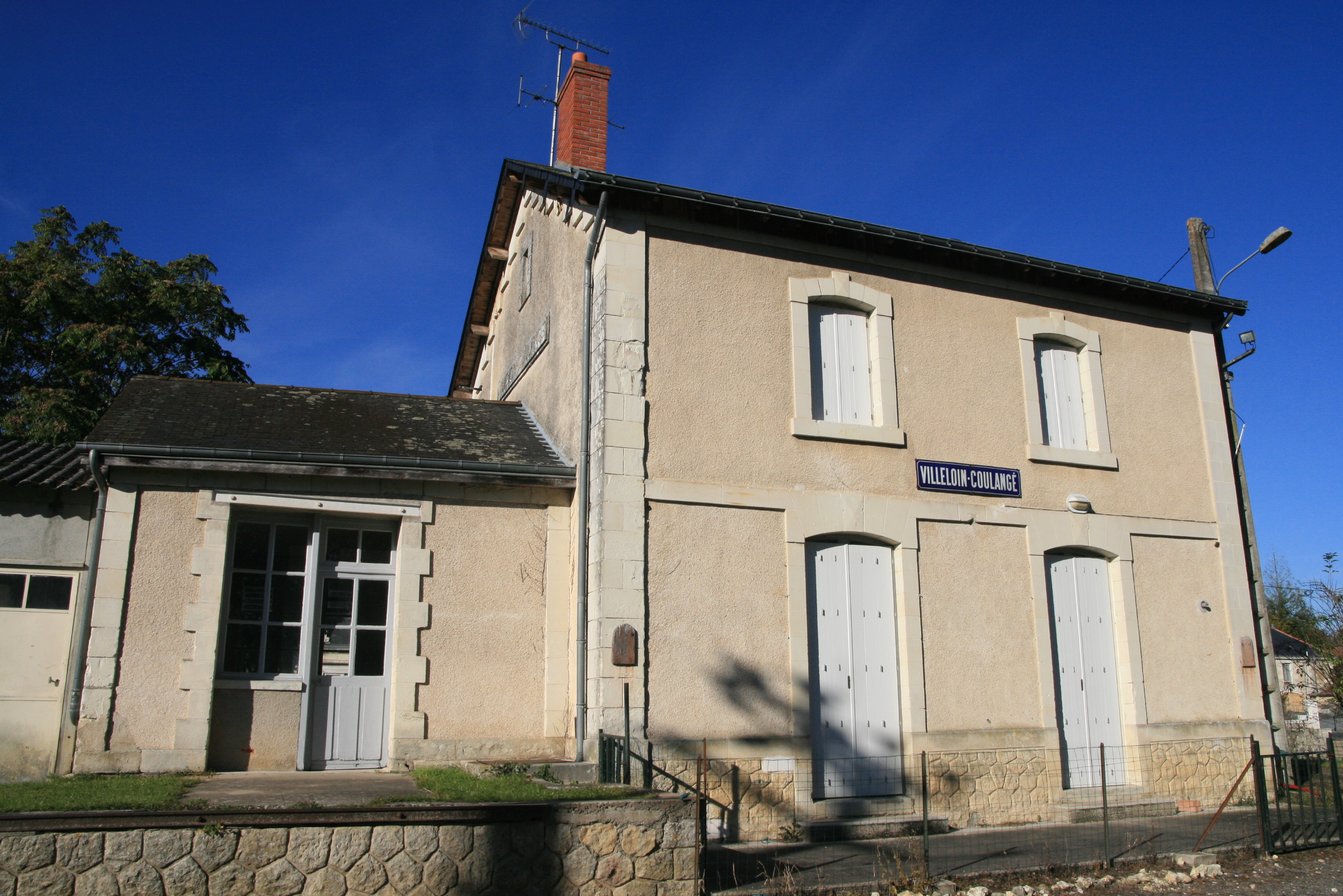 Ancienne gare de Villeloin-Coulangé dans l'Indre-et-Loire. Elle est située dans le bourg du village.